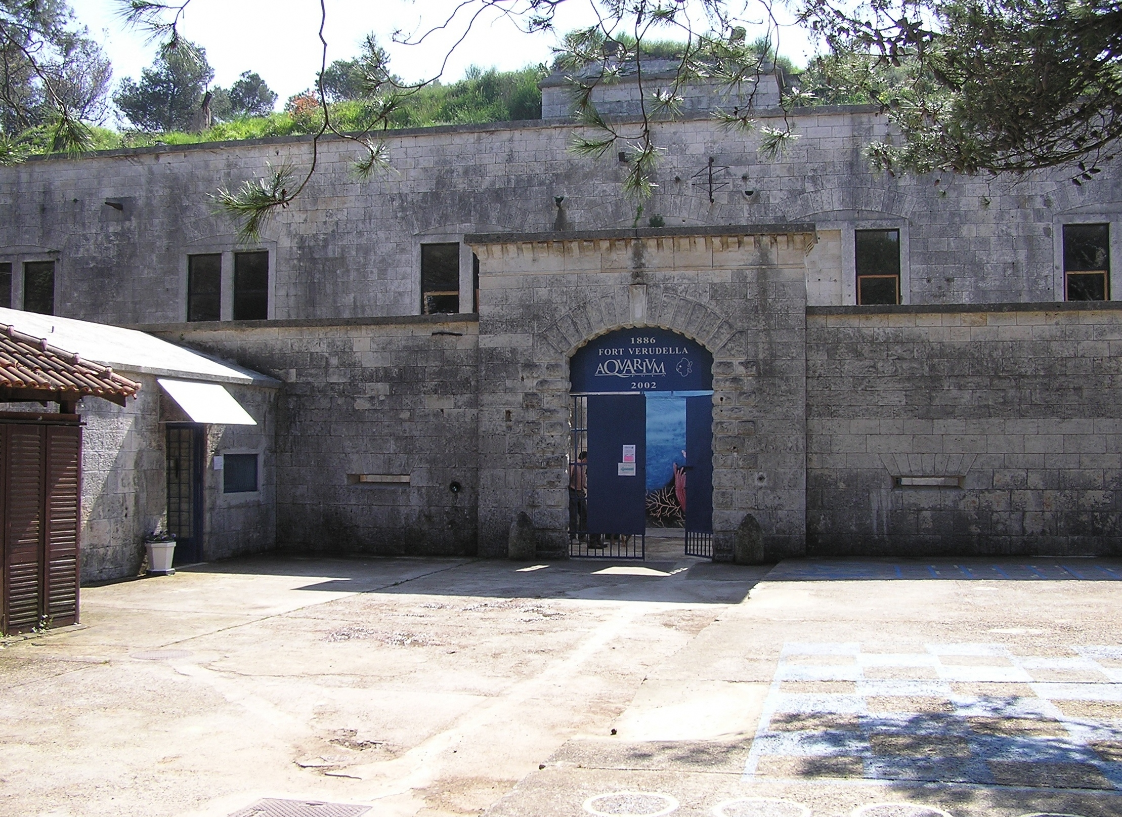 self-made